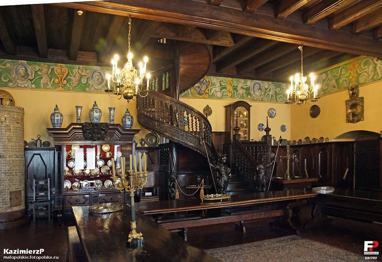 Dawna jadalnia profesorów. Schody pochodzą z jednego z zamków Małopolski.